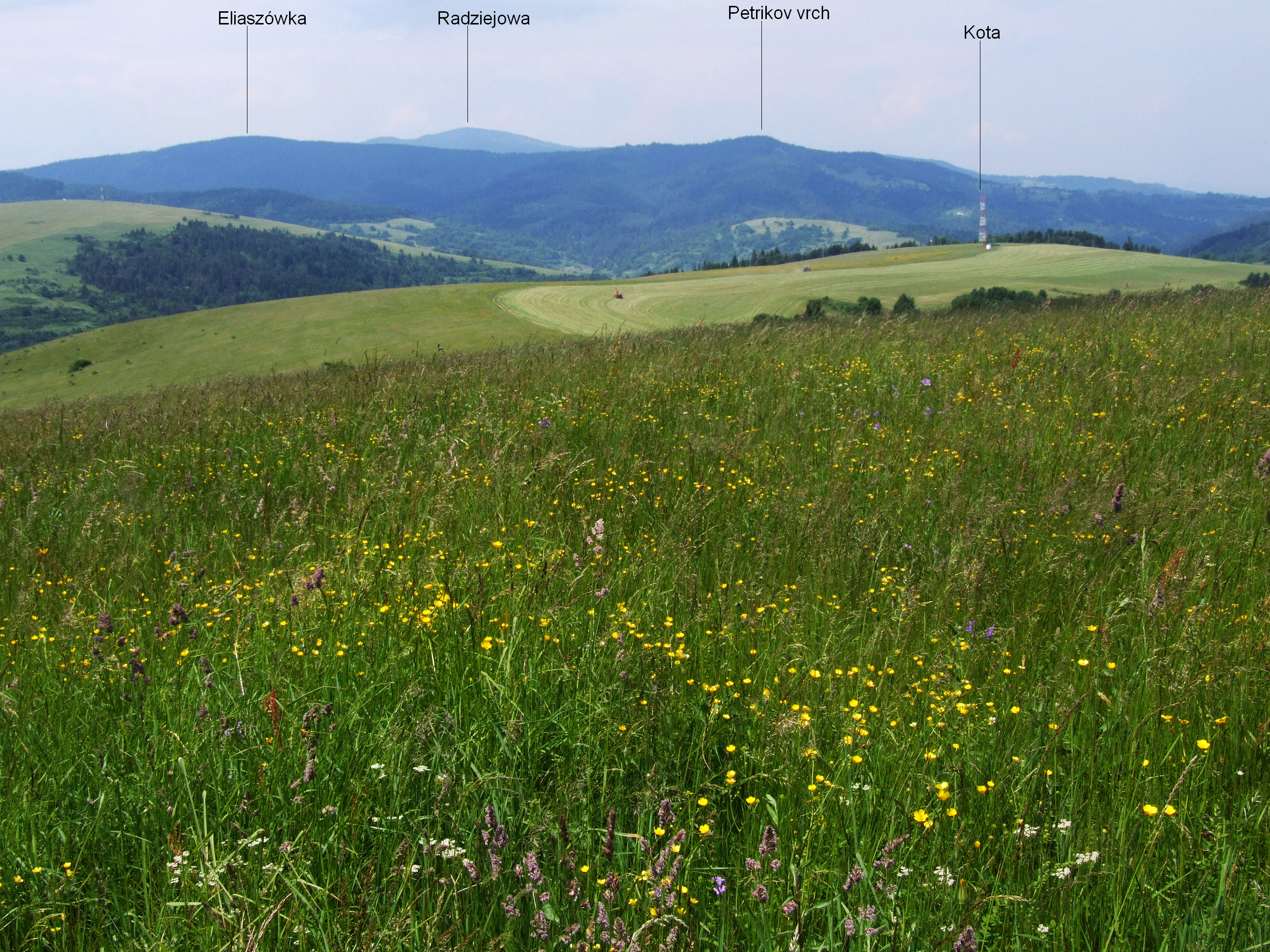 Widok z grzbietu Ośli wierch - Wysoki Gruń